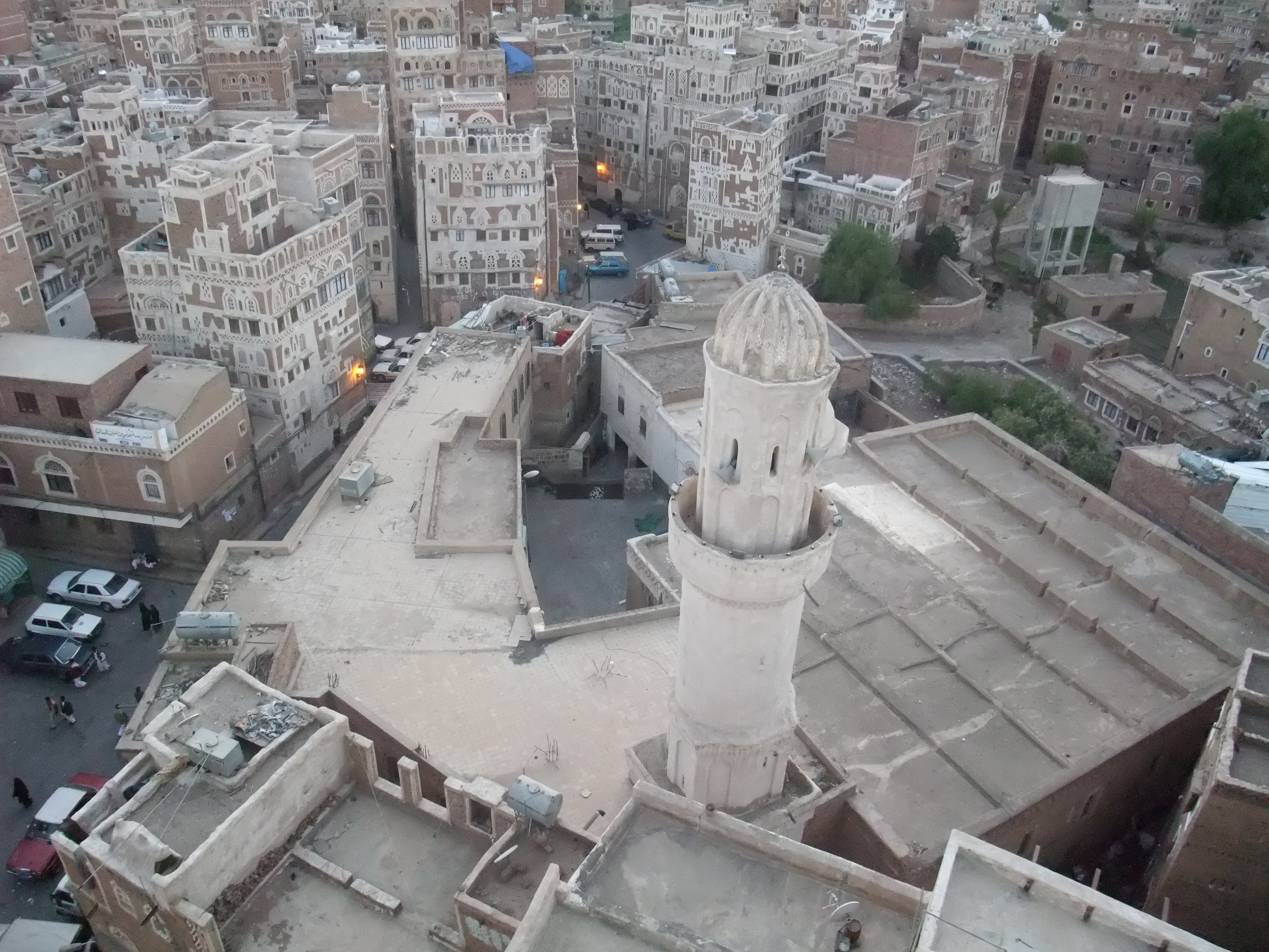 Visión del centro de Old Sana'a